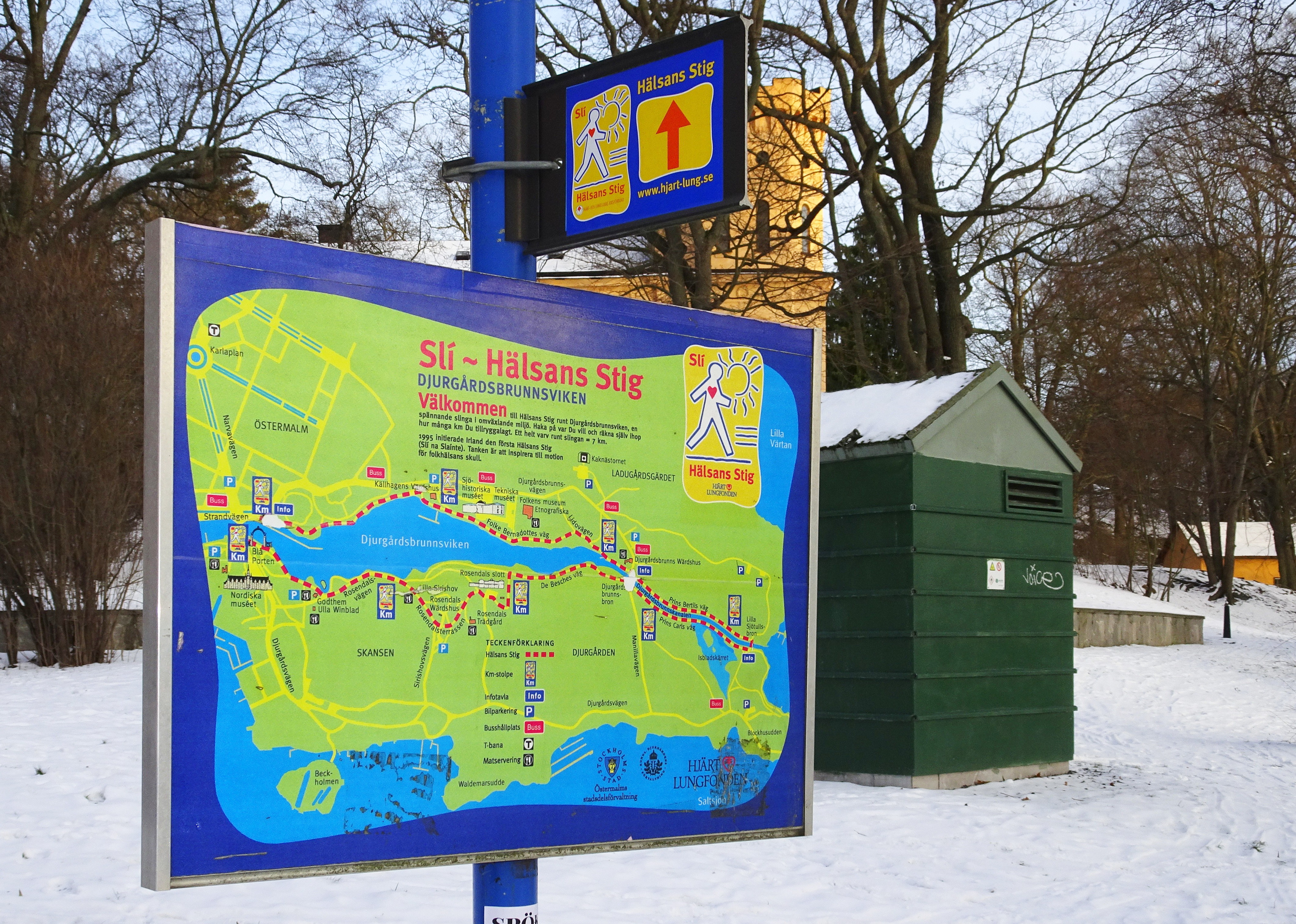 Hälsans Stig på Djurgården runt Djurgårdsbrunnsviken och Djurgårdsbrunnskanalen = 7 km